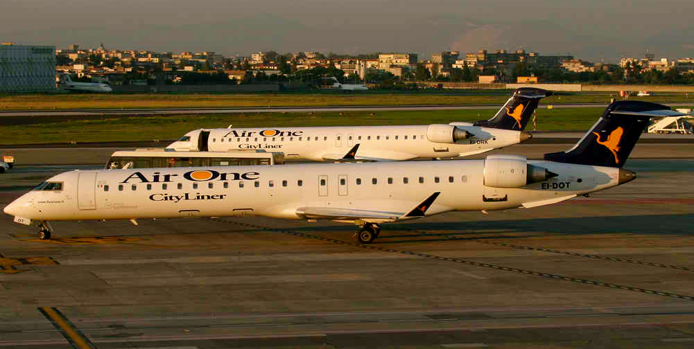 Crj900 Alitalia CityLiner a Napoli